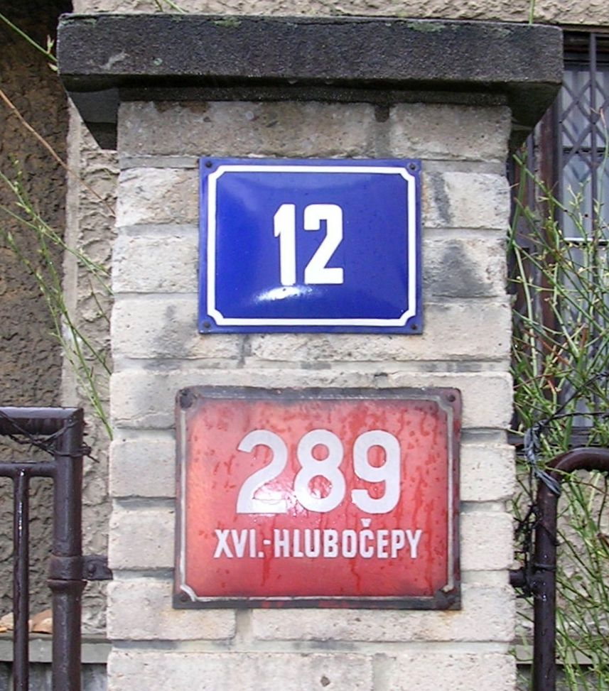 Domovní čísla, Praha, Hlubočepy, Nad pomníkem 289/12. Červené číslo popisné z doby před rokem 1949, modré číslo orientační novější